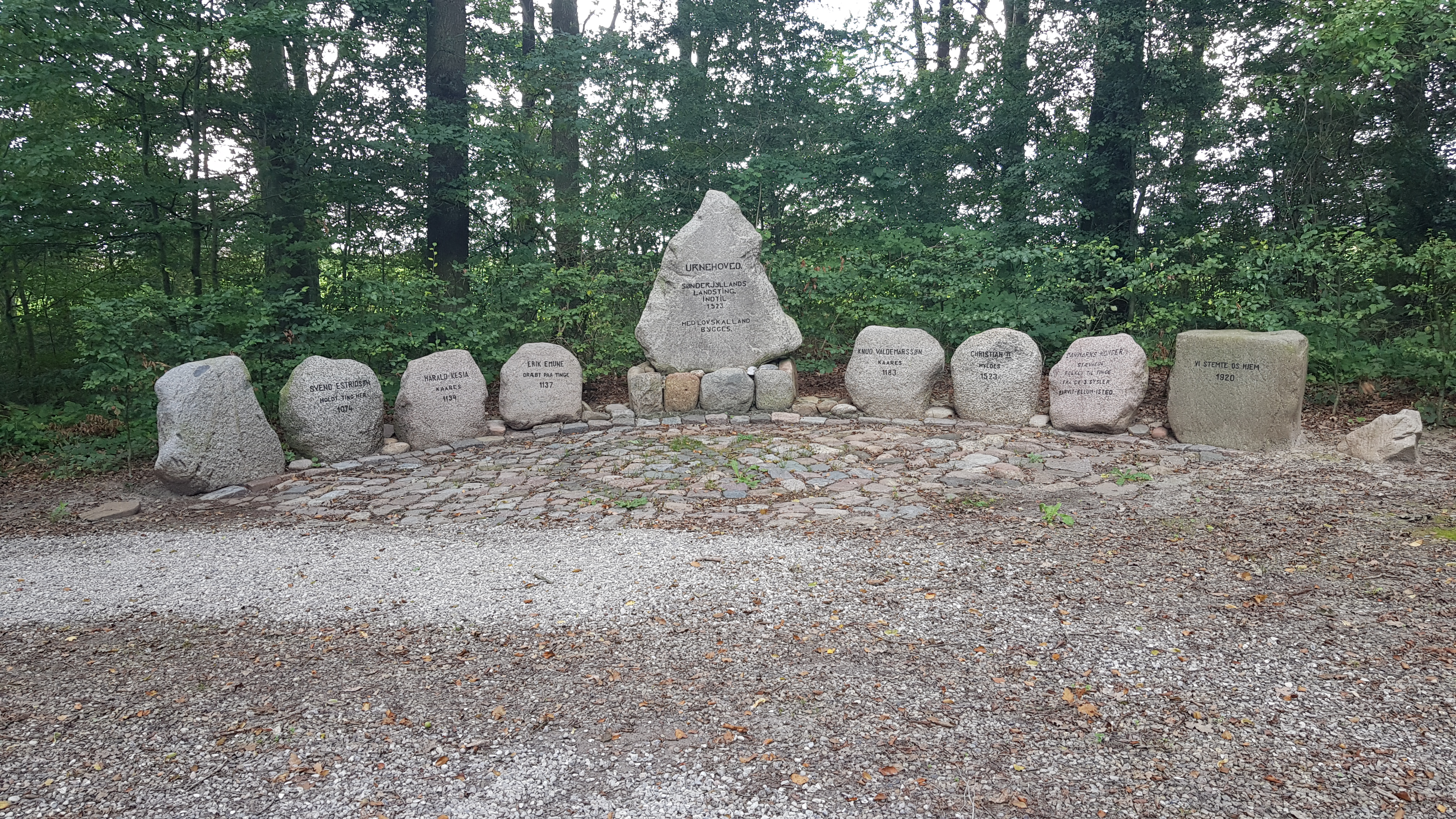 Urnehoved Tingsted